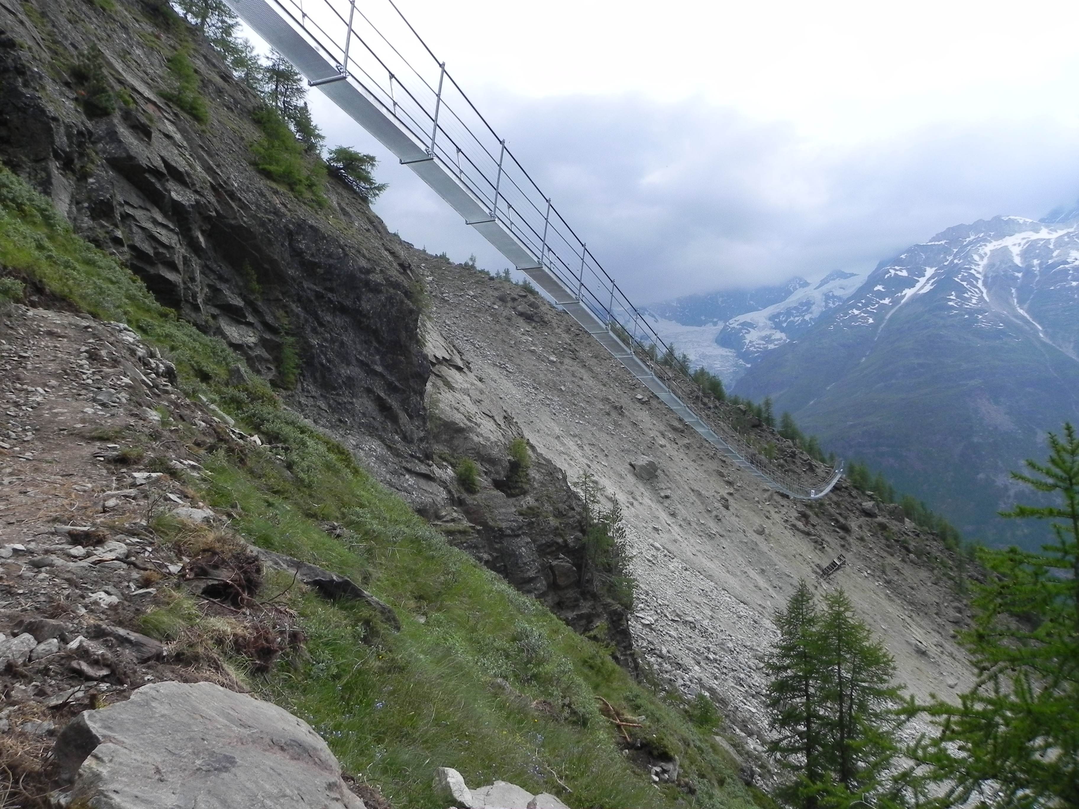 Hängebrücke 250 m über Steinschlag